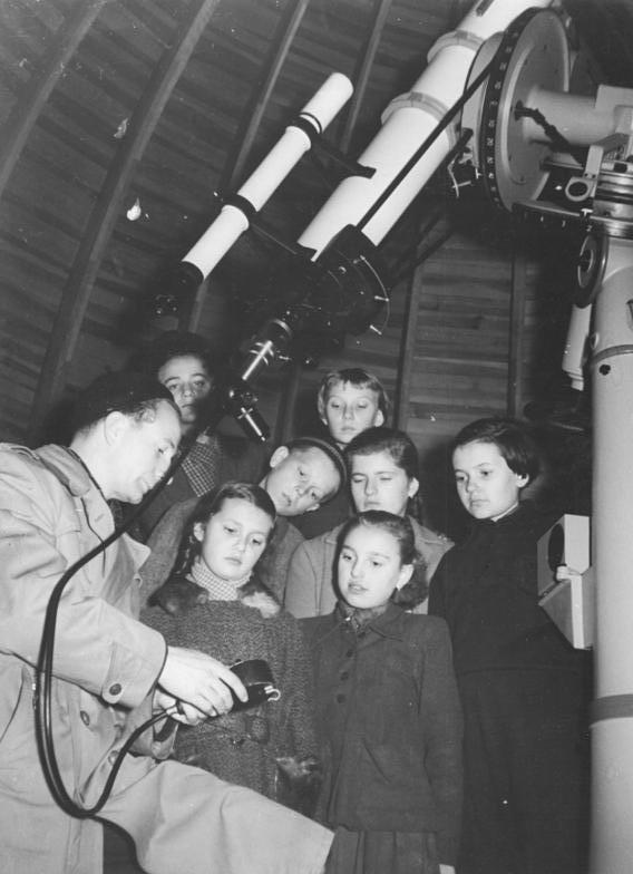 Gera, Jugendstunden, besuch im Planetarium Zentralbild Bez. Red. Erfurt Schw-Ku. 3 Motive 8.11.1955 Laetsch Jugendstunden zur Vorbereitung der Jugendweihe in Gera Infolge der interessanten Themengestaltung der Jugendstunden, die den Jugendlichen einen Einblick in die Gesetzmässigkeiten der Natur verschaffen, wird die Zahl der Teilnehmer an den Jugendstunden immer grösser. In diesen Tagen besuchten die Schülerinnen und Schüler der Lutherschule in Gera die erste Jugendsternwarte der DDR im Haus der Pioniere in Gera, um sich mit den Himmelskörpers im Weltall vertraut zu machen. UBz: Kollege Egon Müller erklärt Schülern der Lutherschule in Gera den Mechanismus des Gerätes zur Himmelbeobachtung.